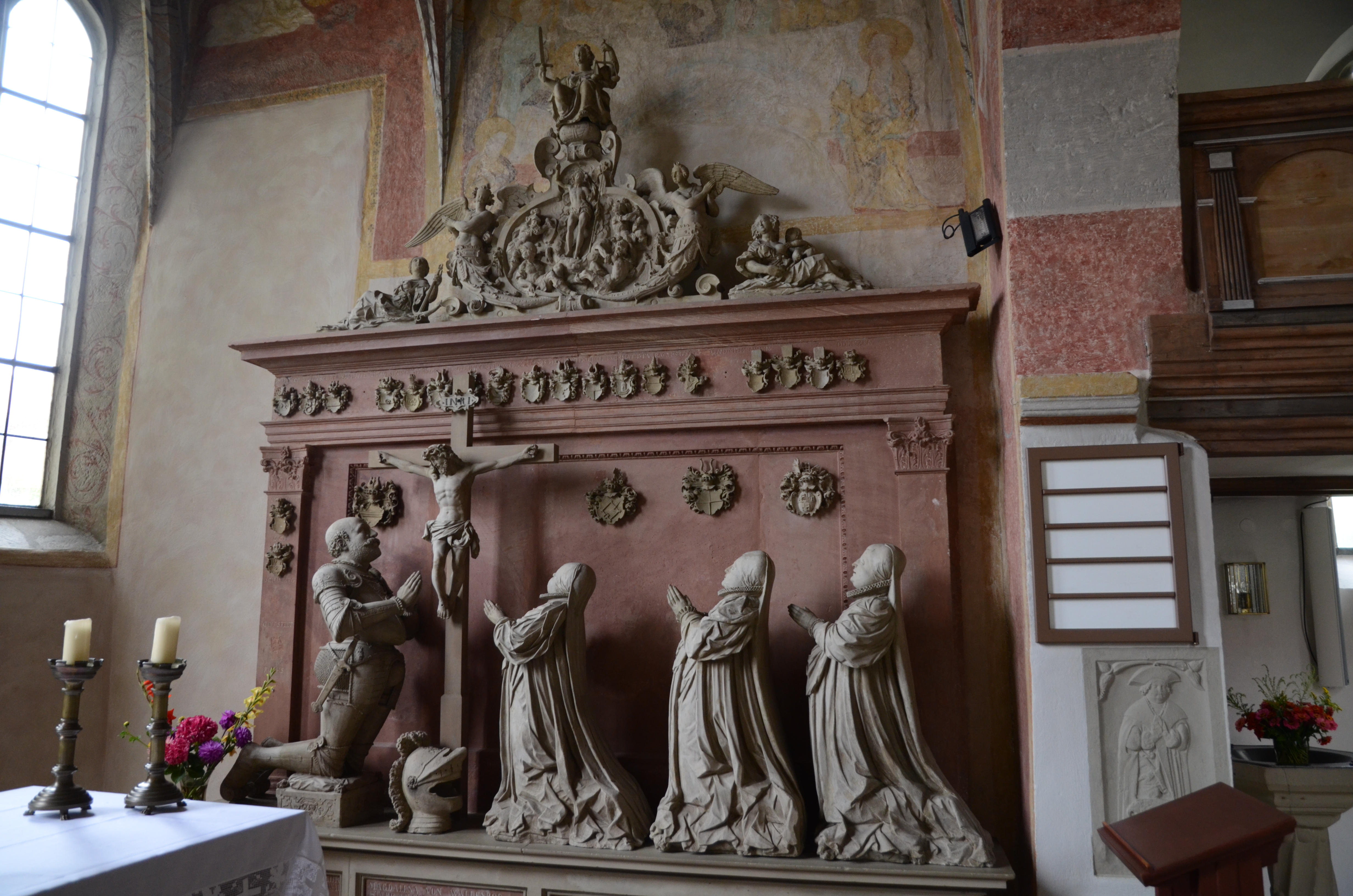 Fröhstockheim, St. Laurentius, Epitaph des Ernst von Crailsheim